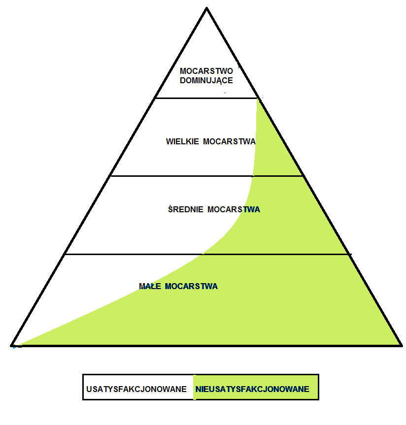 Teoria zmiany siły